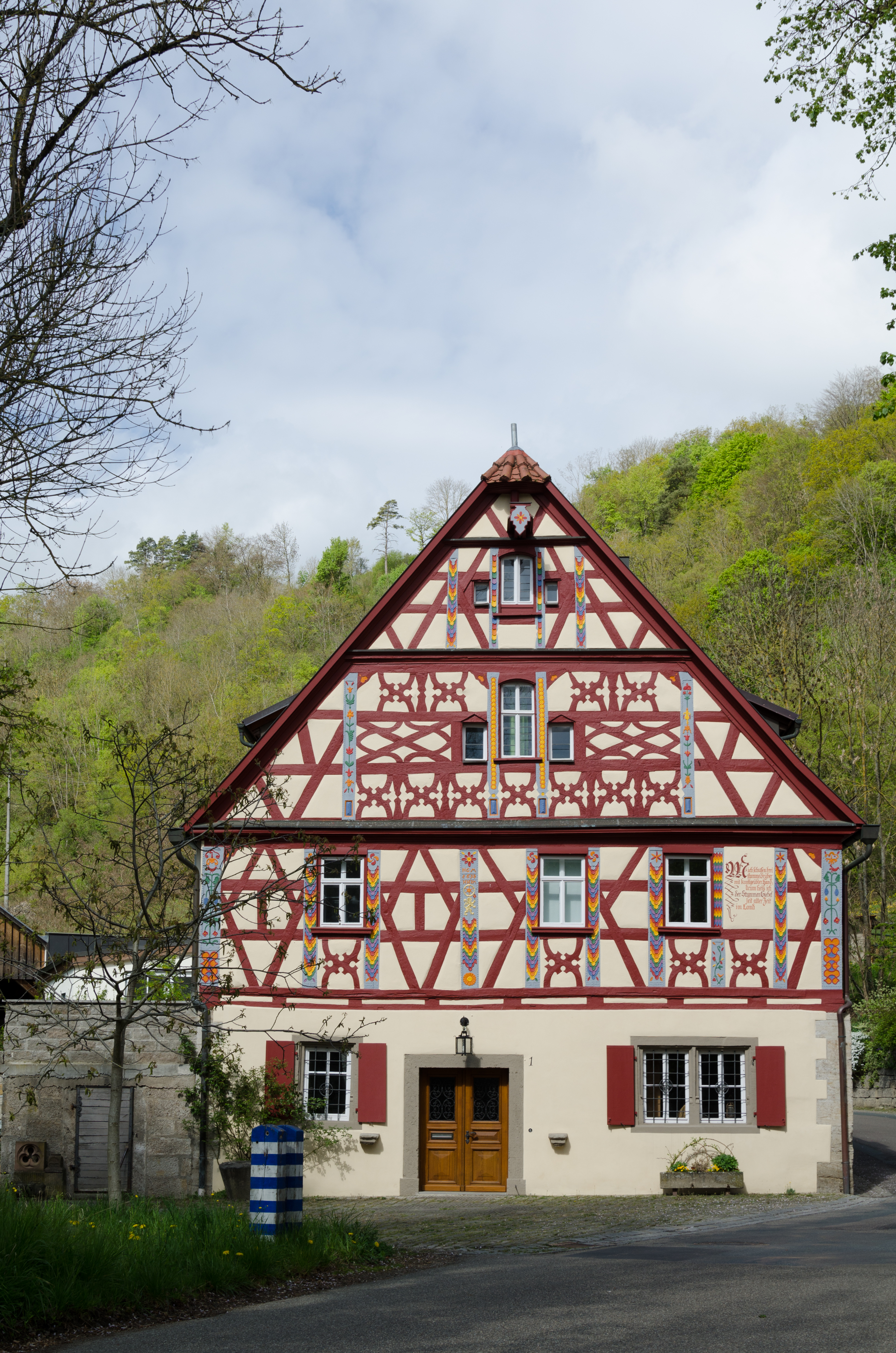 Tauberzell, Hautschenmühle 1